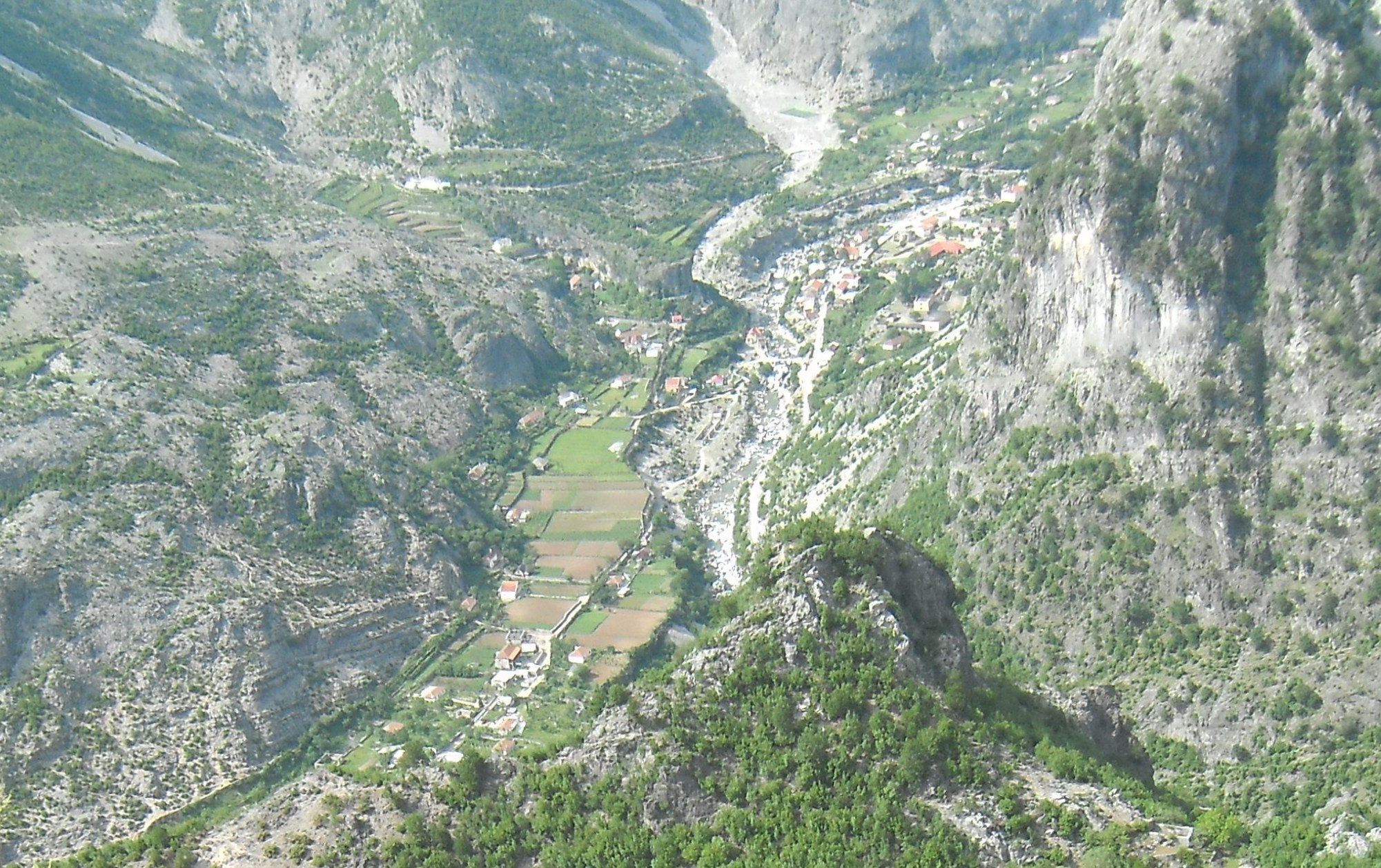 Ausblick vom Dorf Broja, Albanien